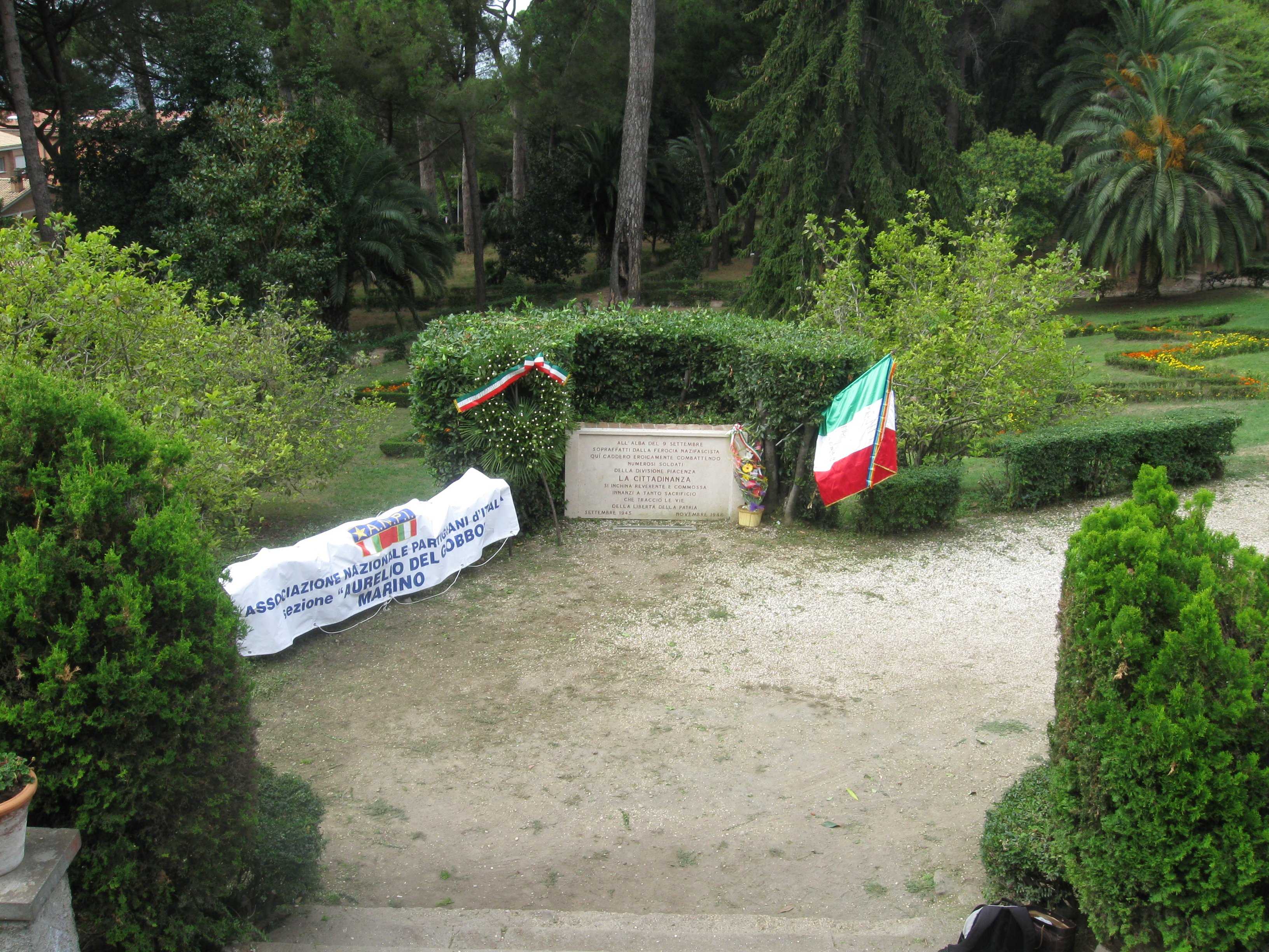 Lapide a Villa Doria ad Albano Laziale (RM)